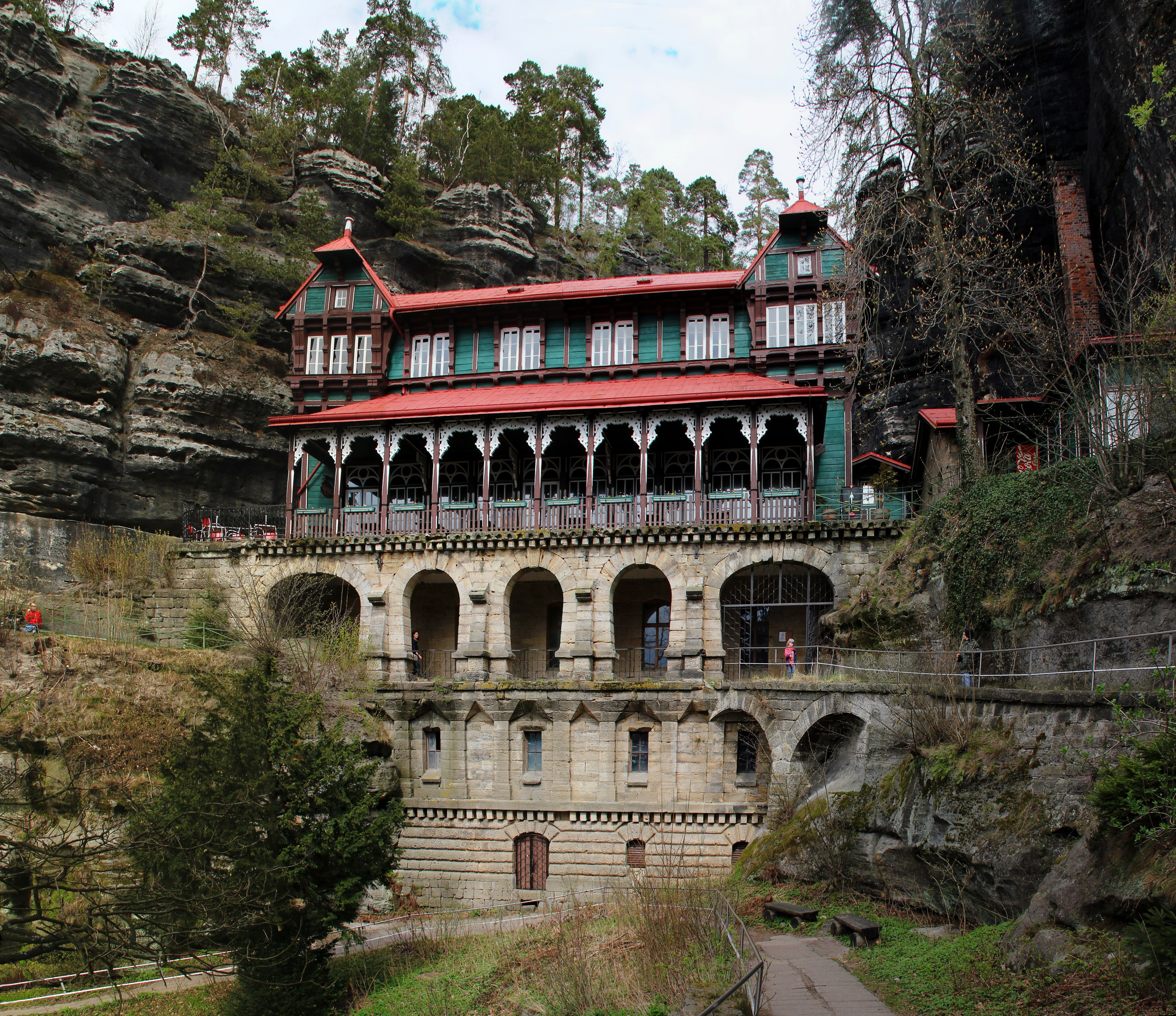 pałacyk skole gniazdo. Czeska Szwajcaria. Czechy.